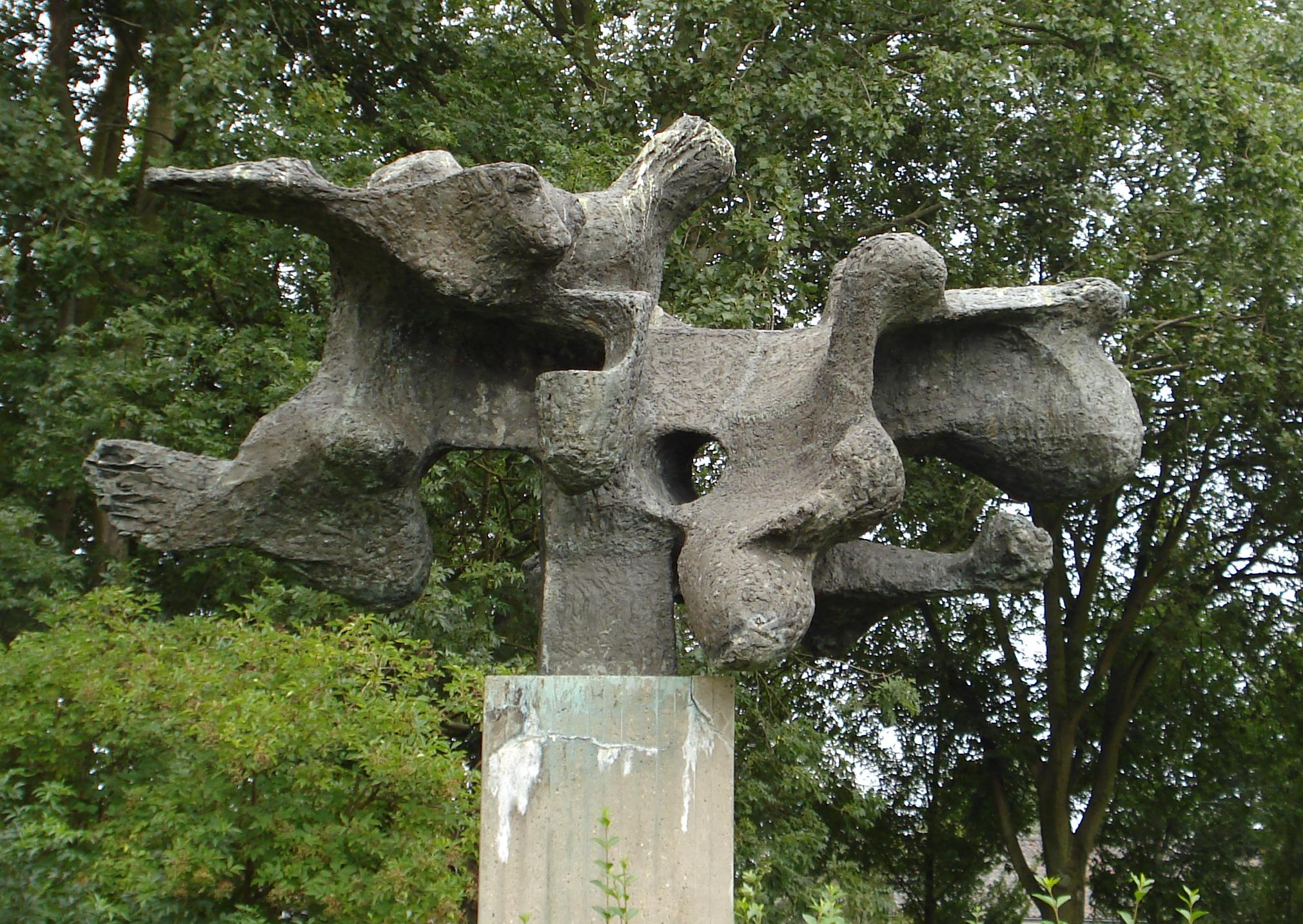 Den Haag, Meppelweg. Kunstwerk "Compositie" van Rudi Rooijackers. The Hague/The Netherlands.